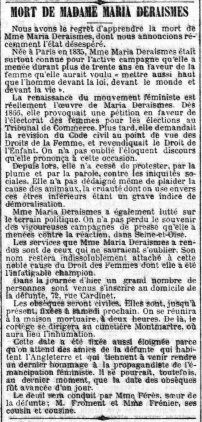 Nécrologie de Maria Deraismes.